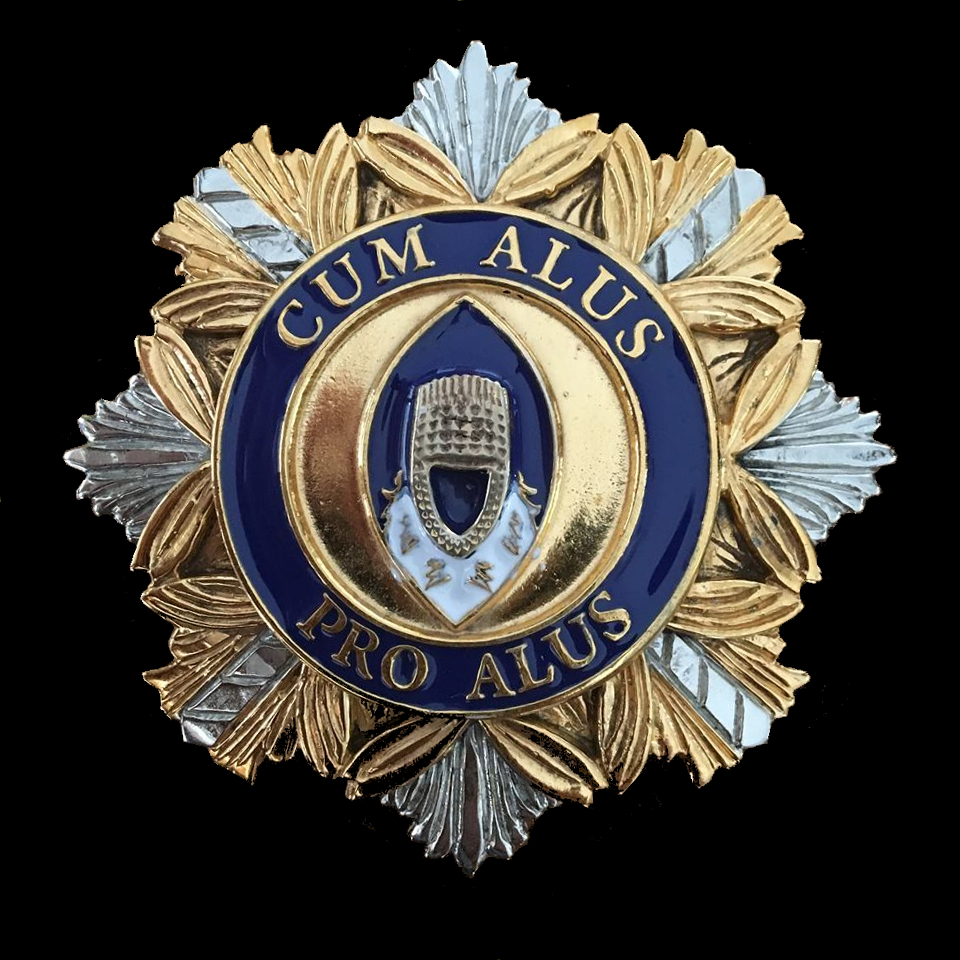 Royal Order of the Engabu